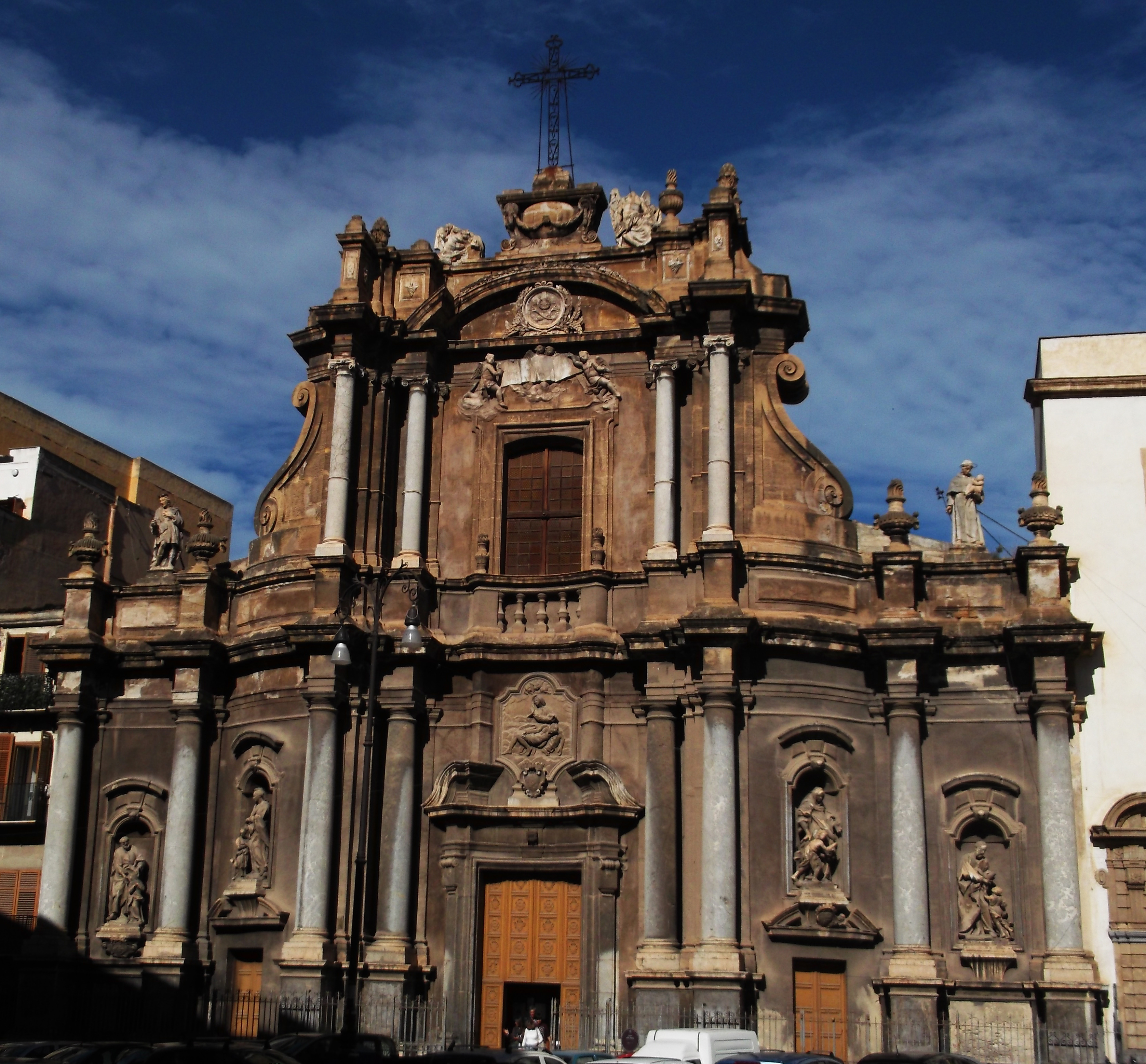 Facciata